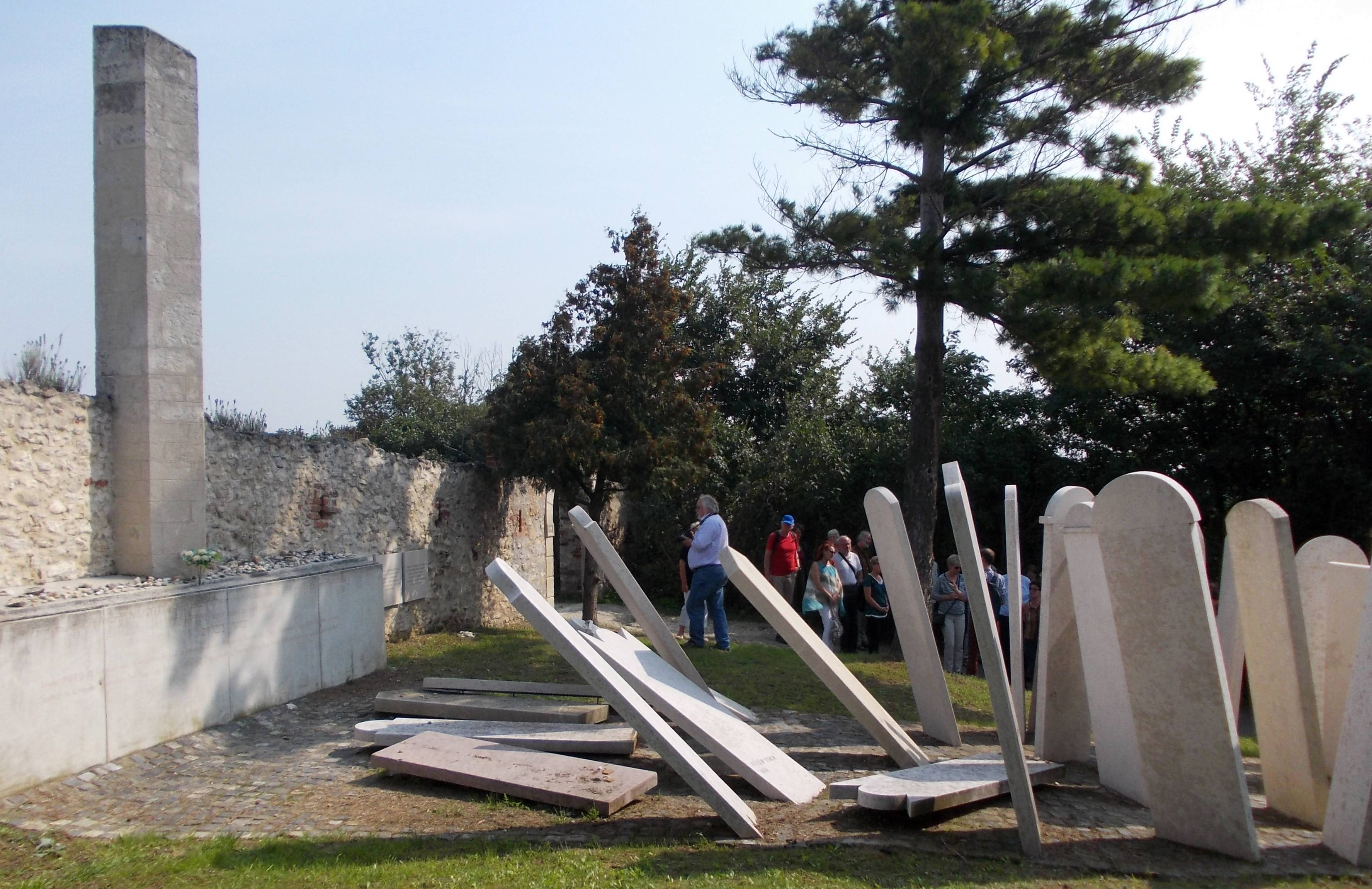 Gedenkstätte in Balf - Mahnmal an der Mauer zu Friedhof und Kirche